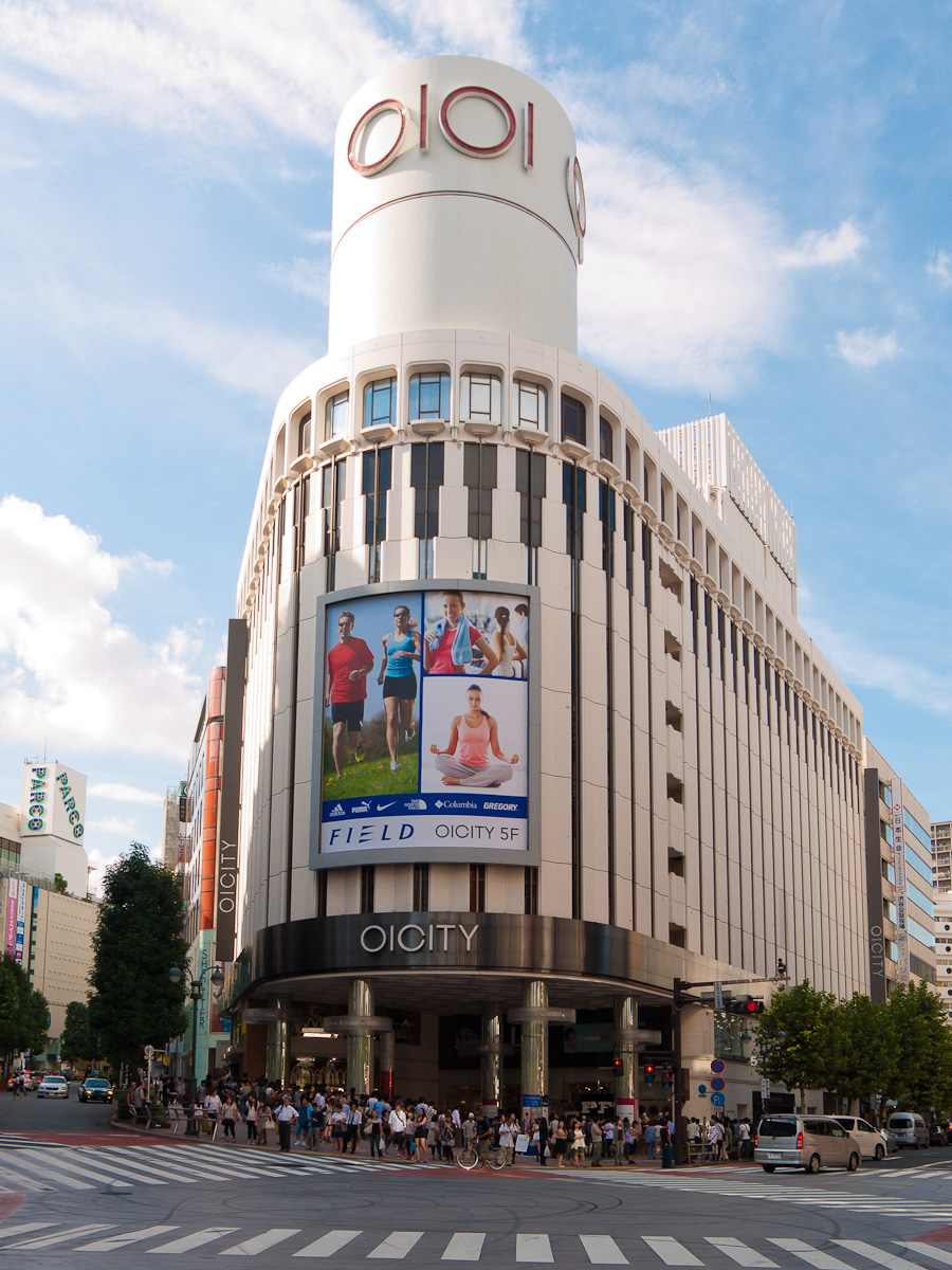 丸井シティー渋谷。